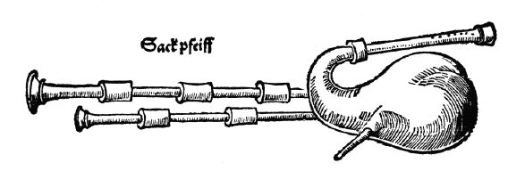 Sackpfeife/Dudelsack vom Anfang des 16. Jahrhunderts. 2 Bordune